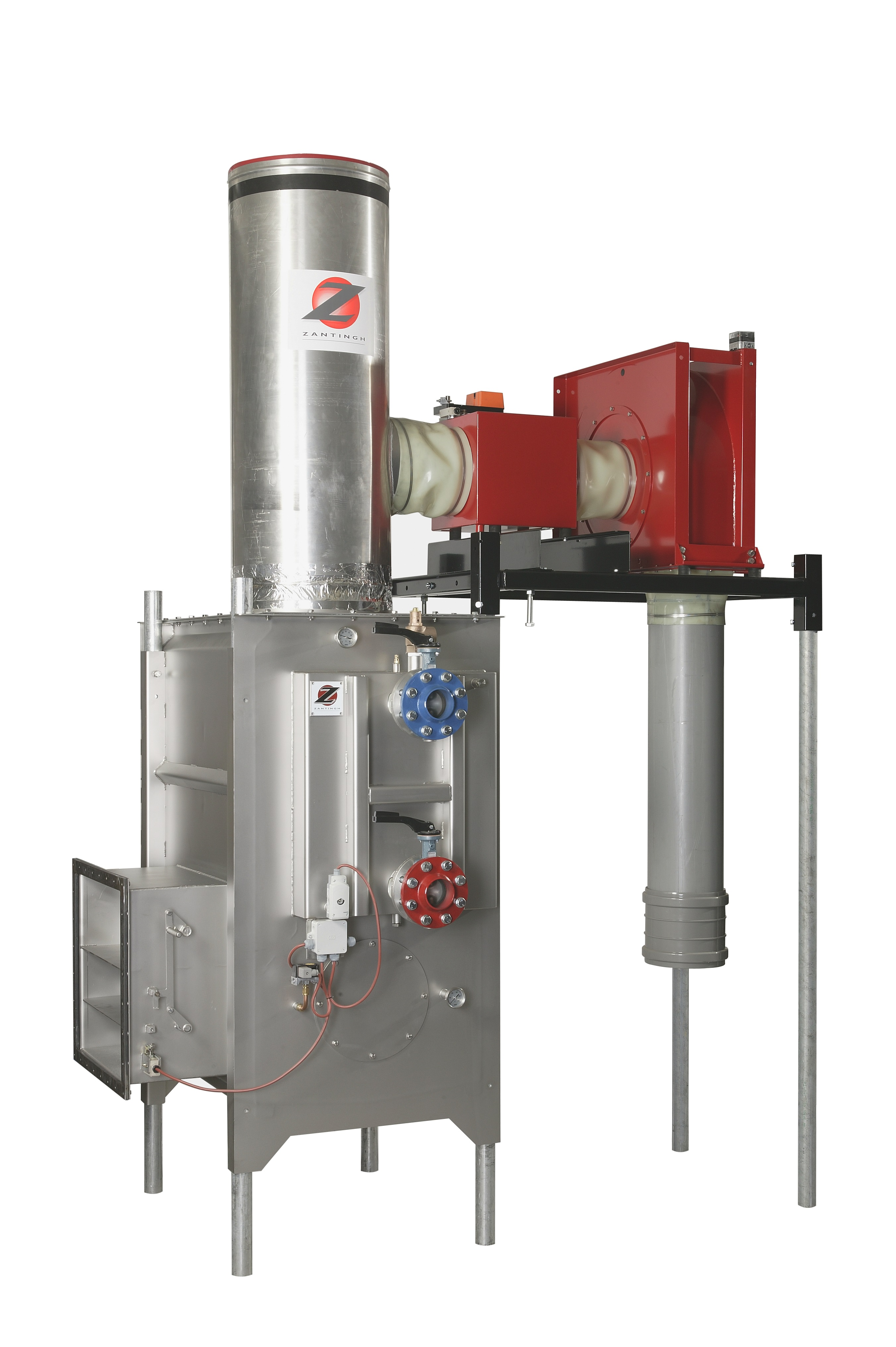 Condensor CO2 en Schoorsteen